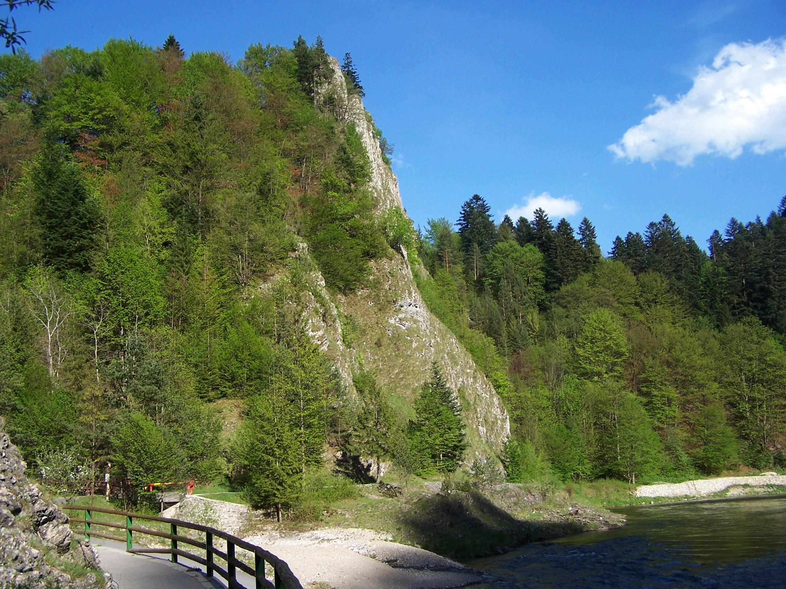 Sama Jedna (Przełom Dunajca w Szczawnicy